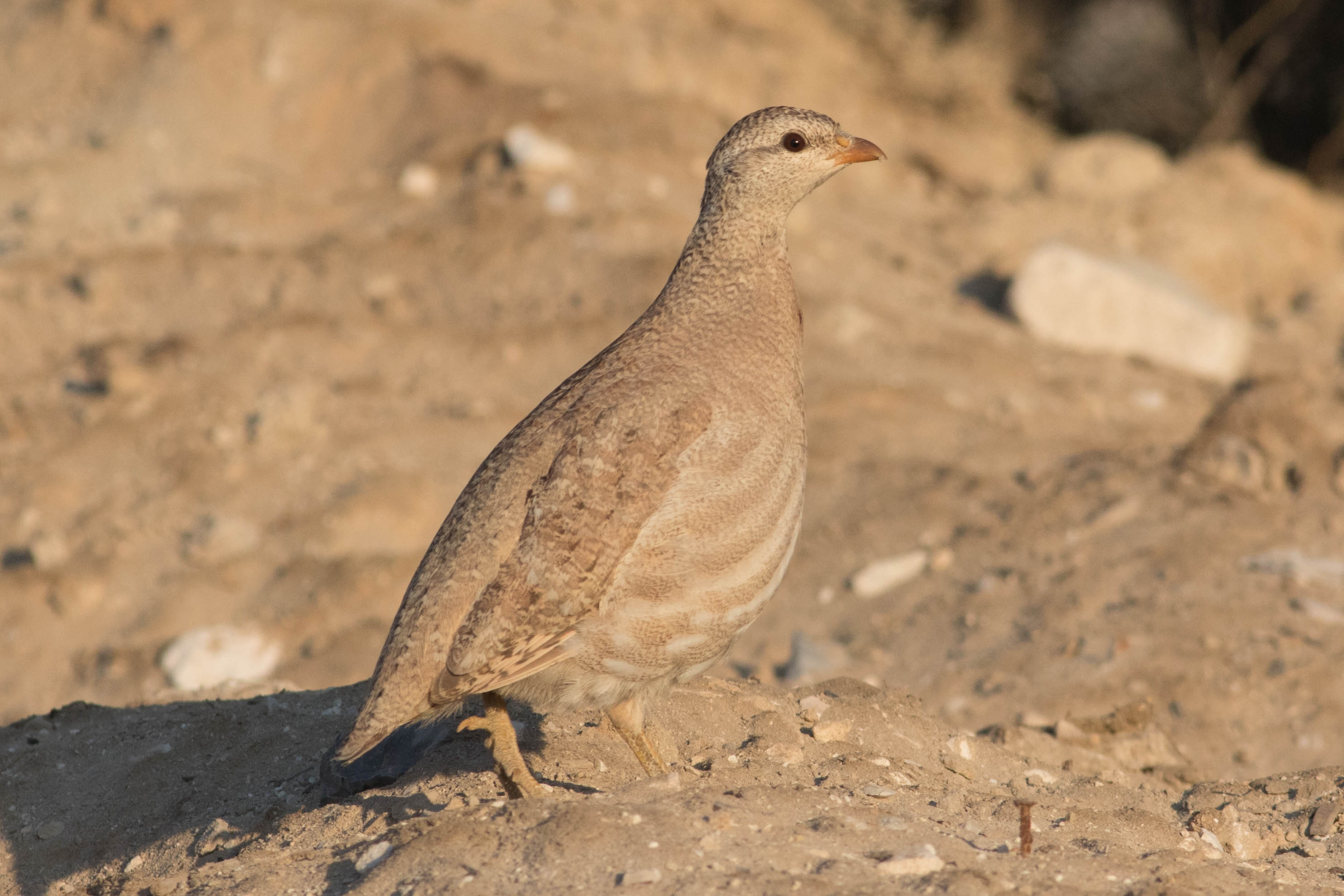 קורא מדברי בעין עבדת